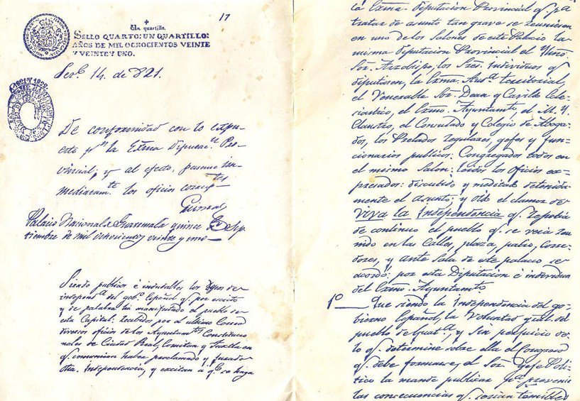 el manuscrito original de la segunda acta de independencia del Reino de Guatemala